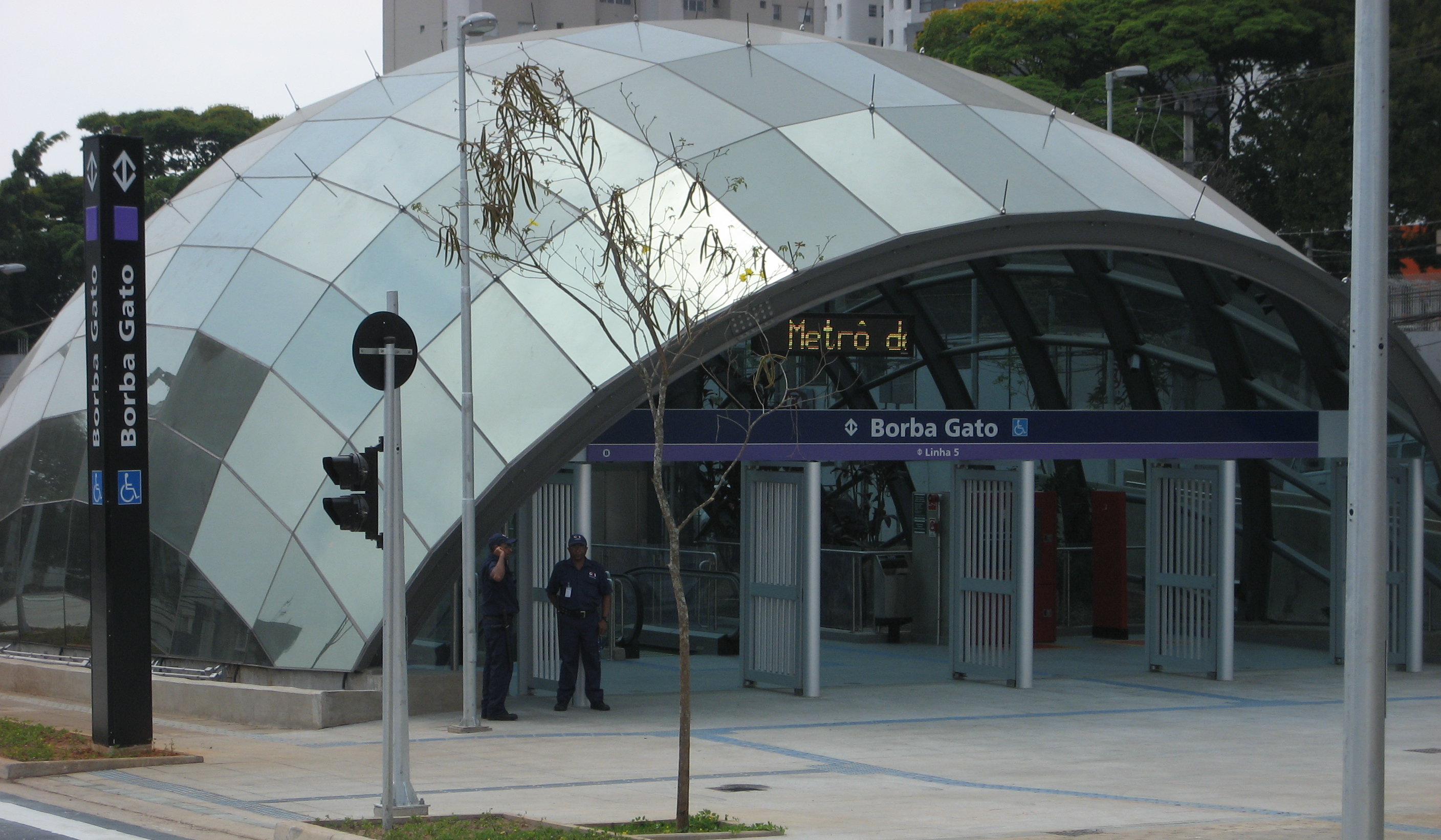 entrada principal da nova estação Borba Gato, com a típica cúpula de entrada, vista desde Av. Santo Amaro